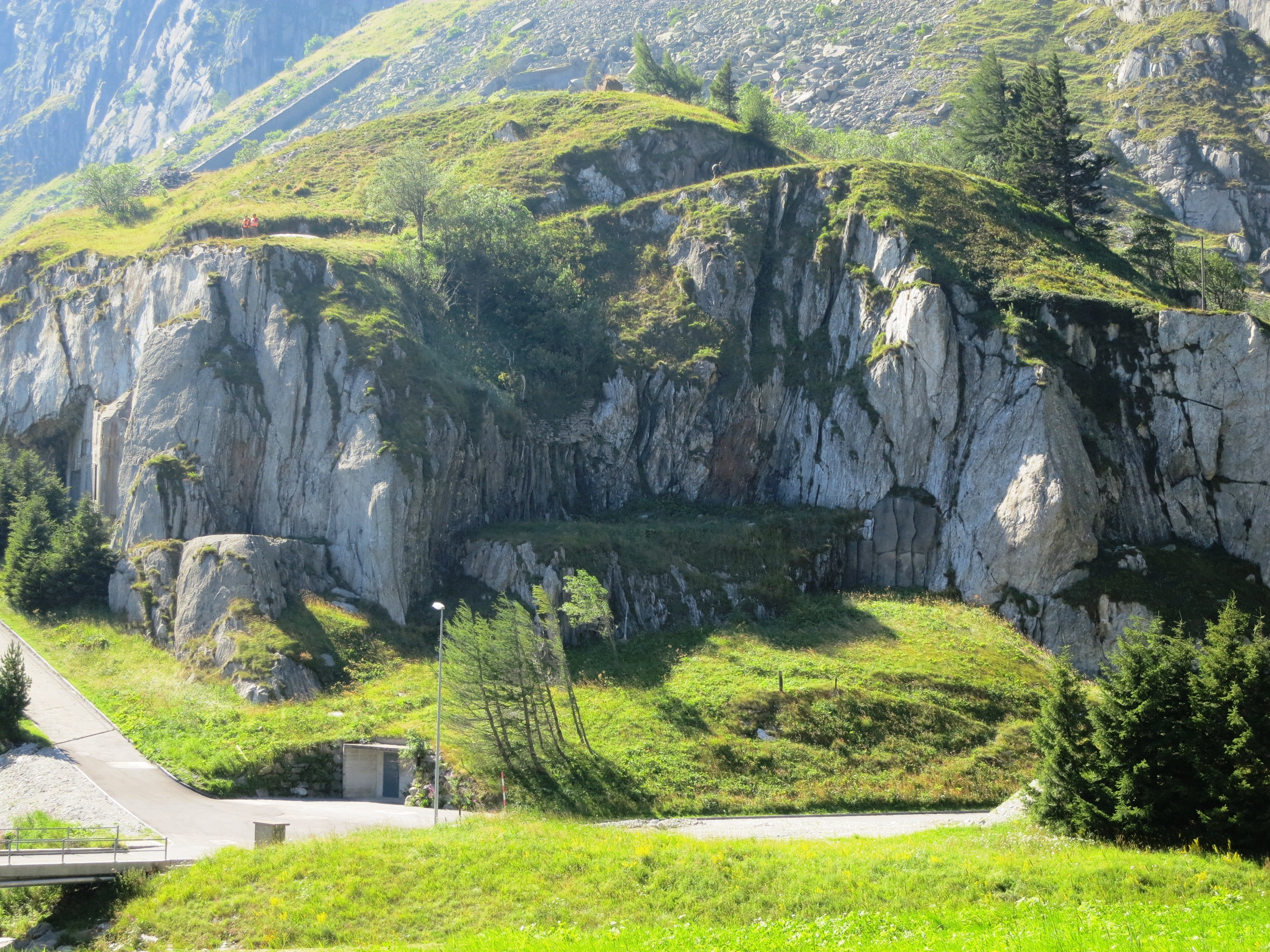 Fort Bühl, Andermatt UR, Schweiz